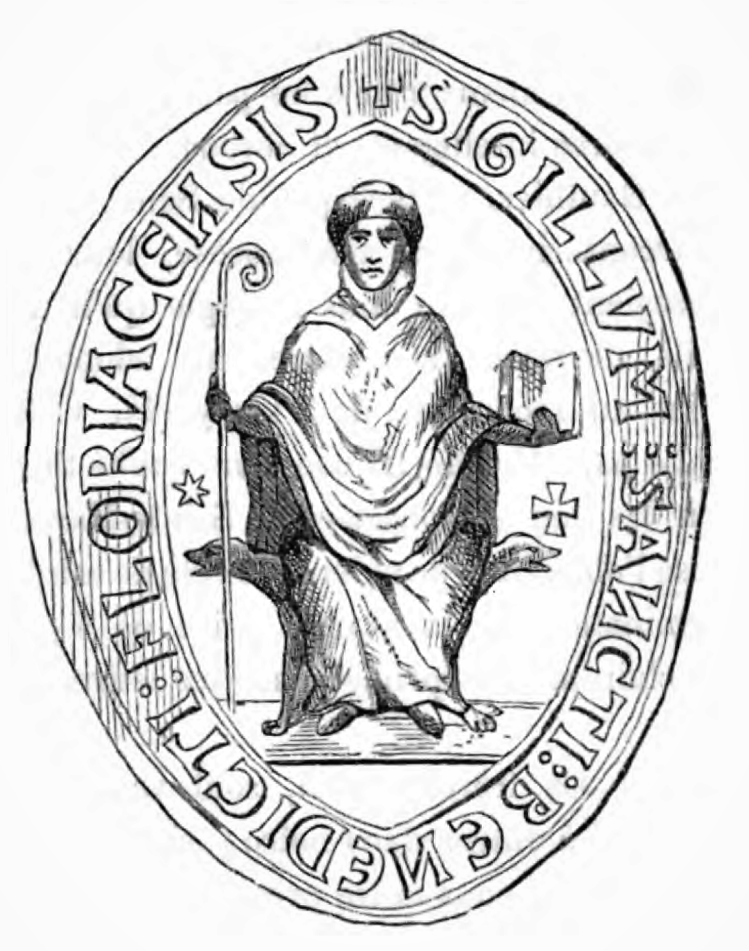 Abbaye de Saint-Benoît-sur-Loire, Sceau